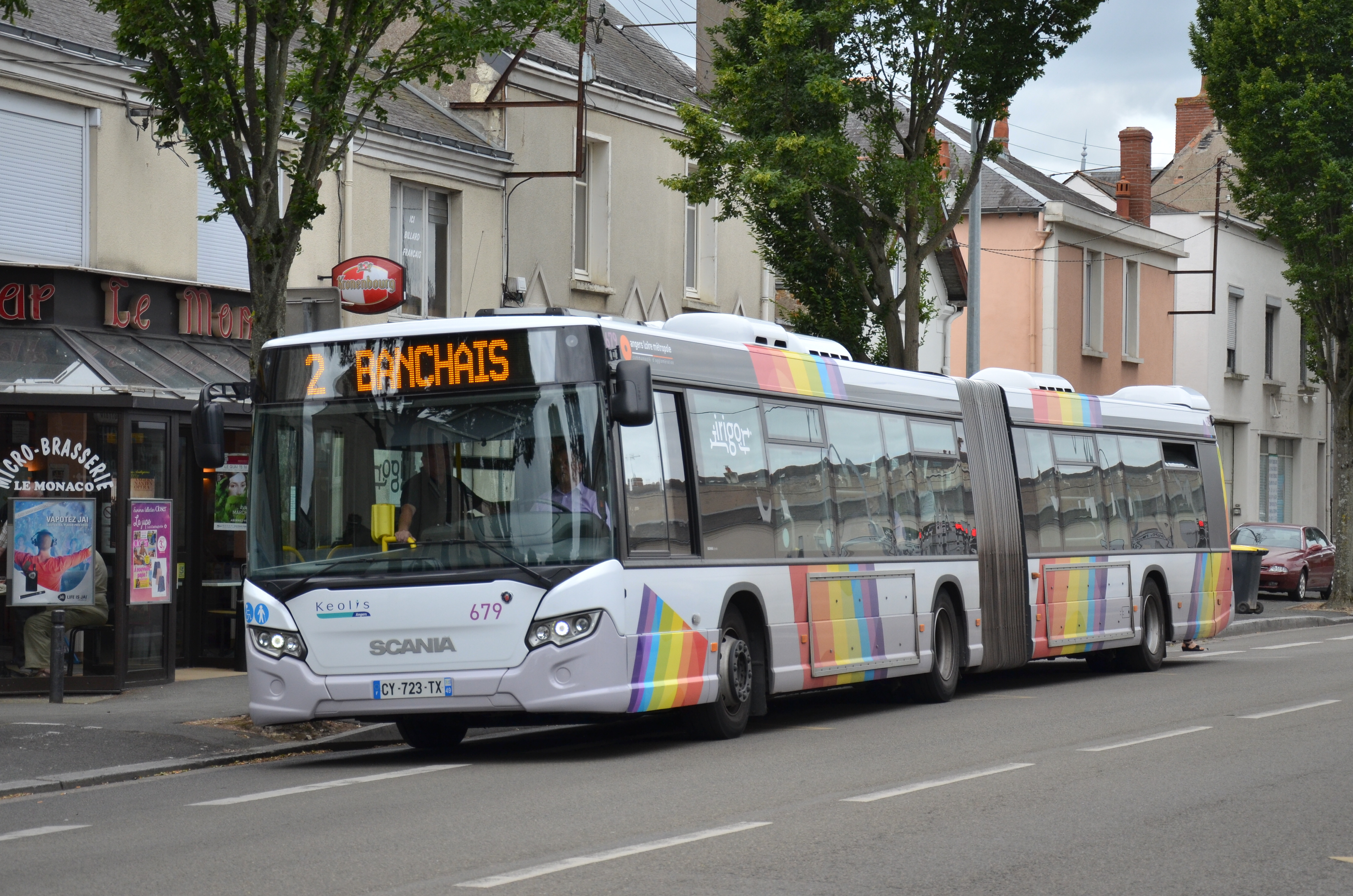 Scania Citywide 18 n°679 sur la ligne 2 du réseau Irigo d'Angers, quittant l'arrêt Brisepotière.